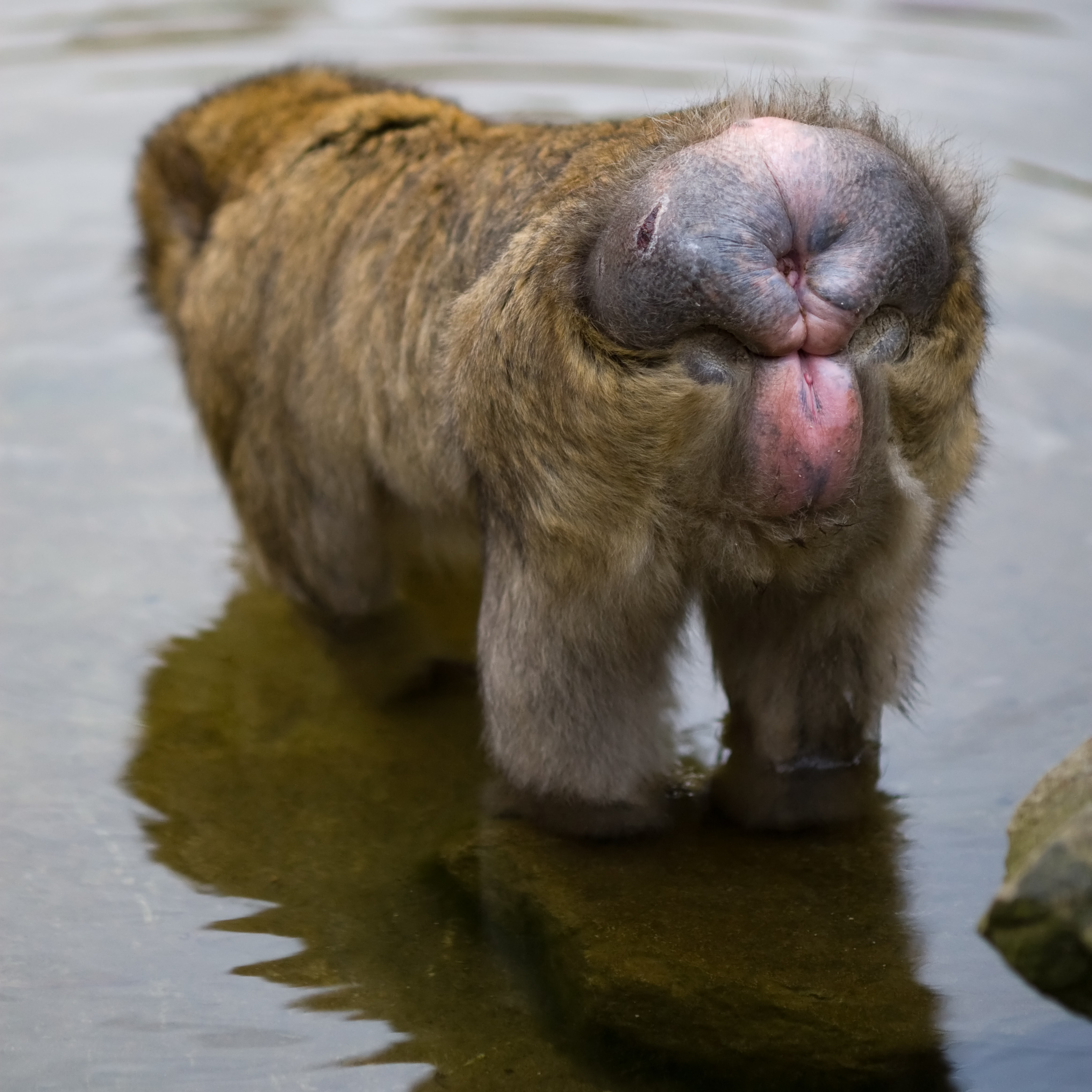 Barbary macaque - rear side